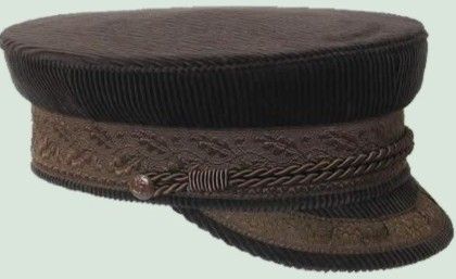 Prinz-Heinrich-Mütze Fotograf: presse03, selbst fotografiert 2005 Lizenz: GNU-FDL